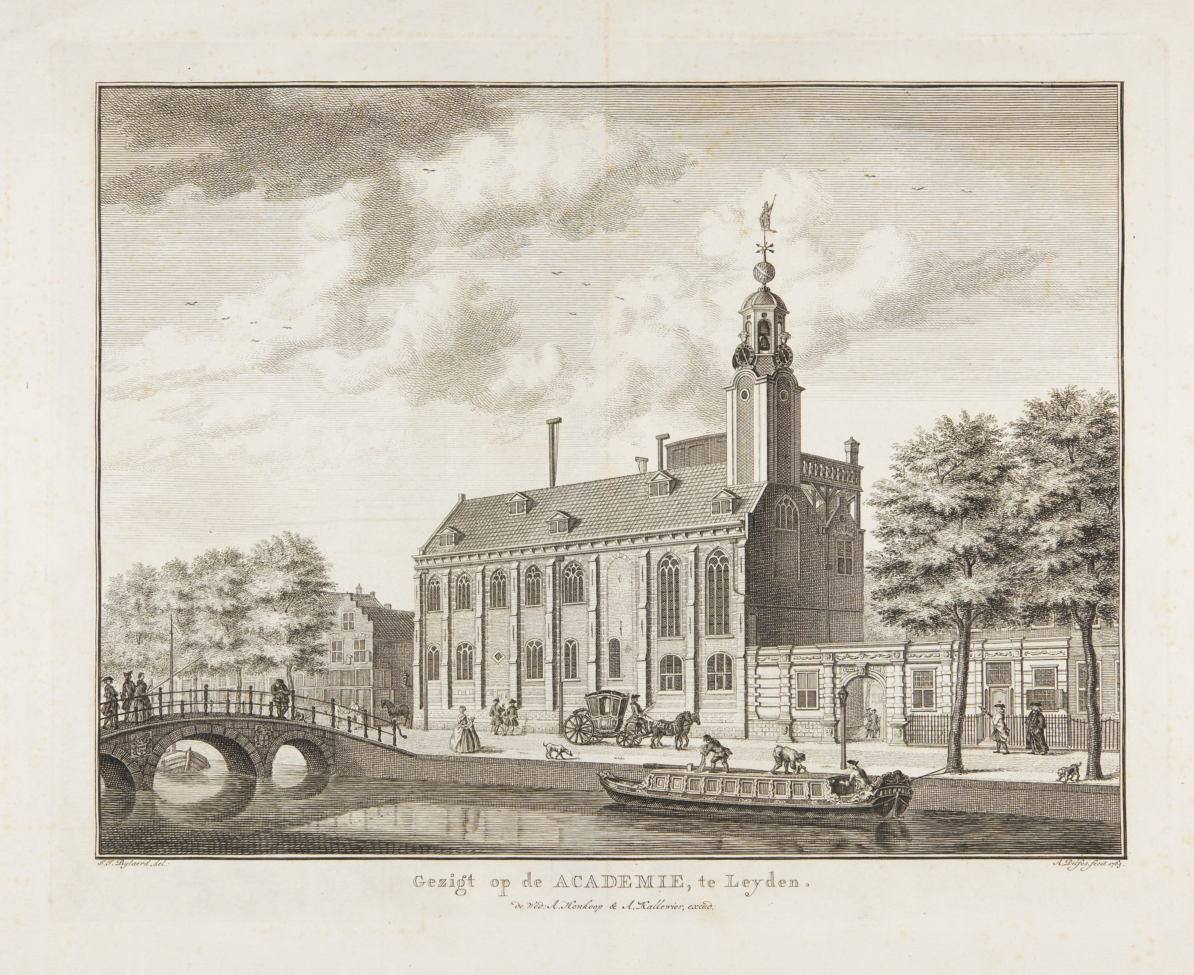 "Gezigt op de ACADEMIE, te Leyden." [Academiegebouw]; getekend door Joannis Jacobus Bylaert (1734-1809) en in 1763 op de plaat gebracht door Abraham Delfos (1731-1820). Uitgegeven door Wed. Abraham Honkoop e.a. (boekdruk); Wed. A. Honkoop en A. Kallewier (prentdruk) in de uitgave F. van Mieris en D. van Alphen, Beschryving der stad Leyden, haare gelegenheid, oorsprong, vergrootinge, etc., 3 delen, Leyden, 1762-1784